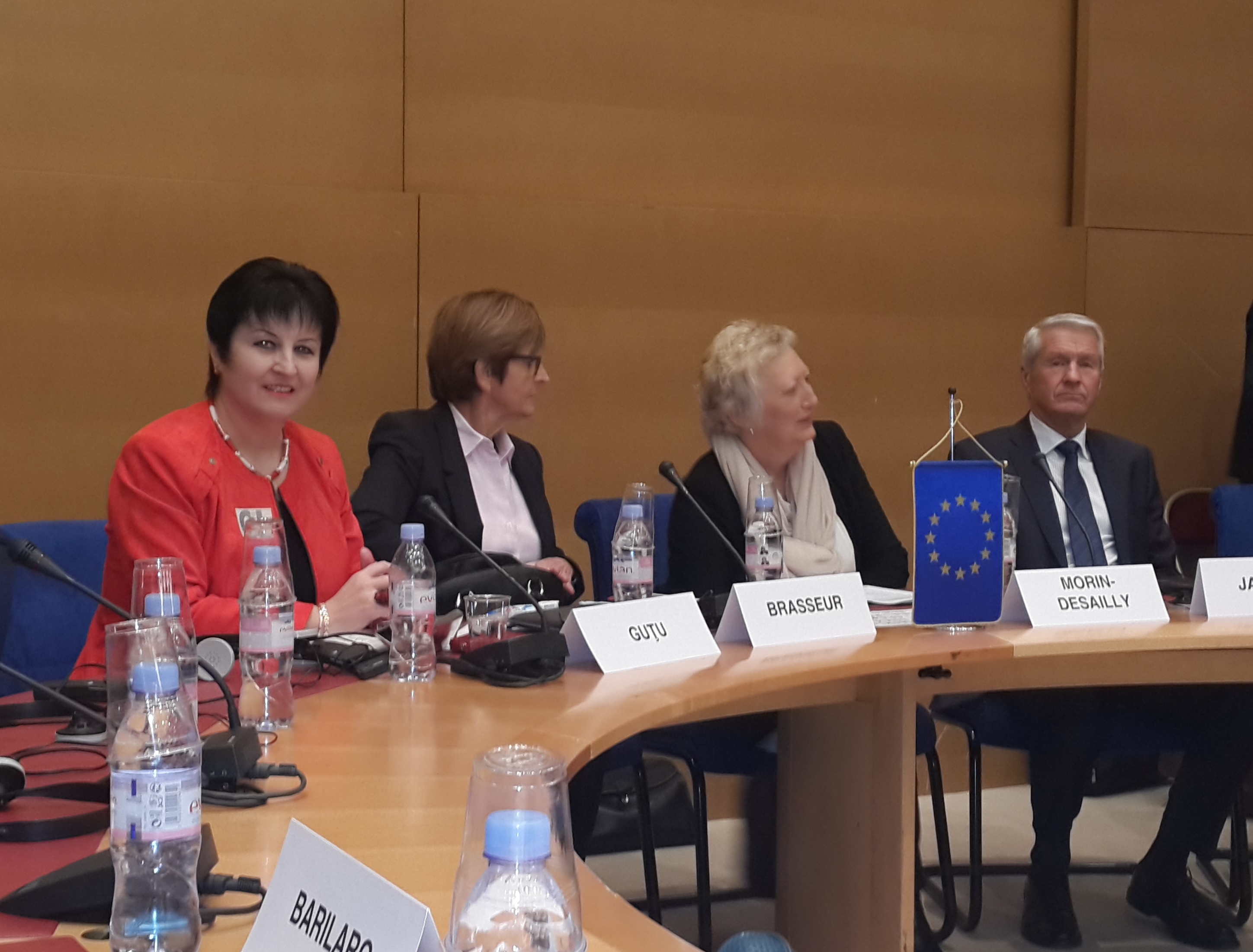 Alături de Anne Brasseur, președinta APCE și Tobjorn Jagland, Secretarul Genaral al CoE